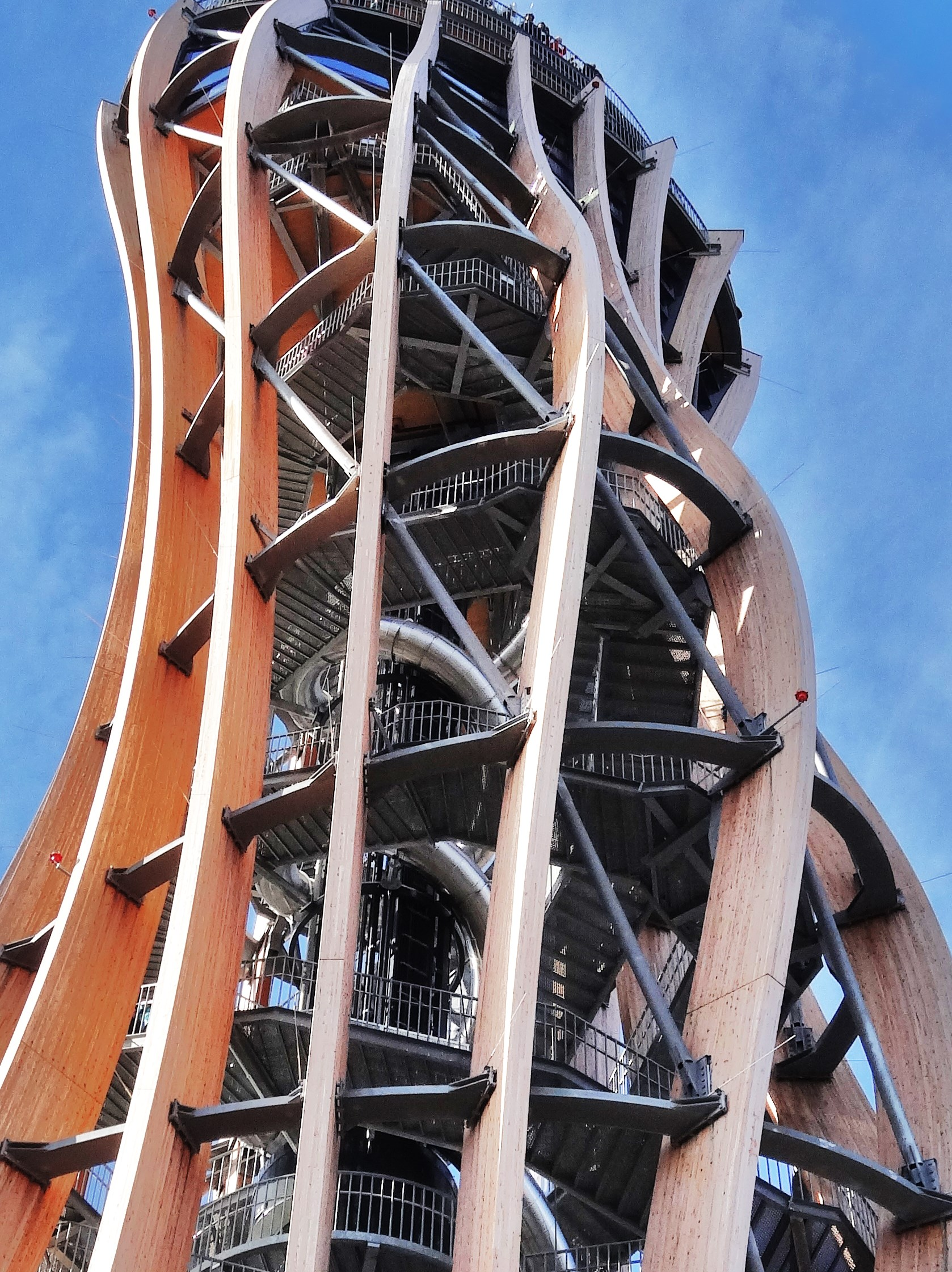 Aussichtsturm auf dem Pyramidenkogel, Details der Holz-Stahl-Konstruktion